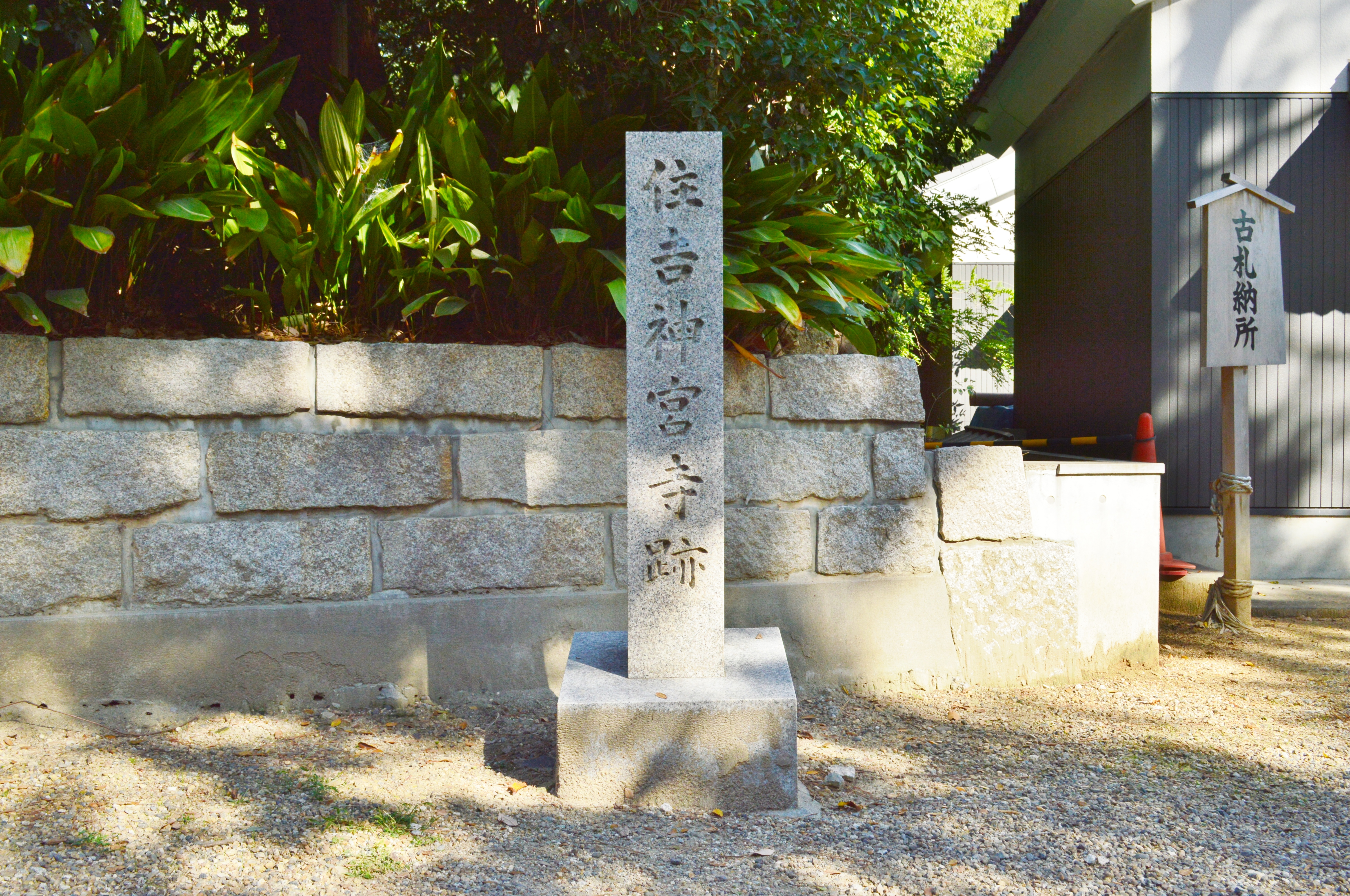 住吉大社 住吉神宮寺跡碑